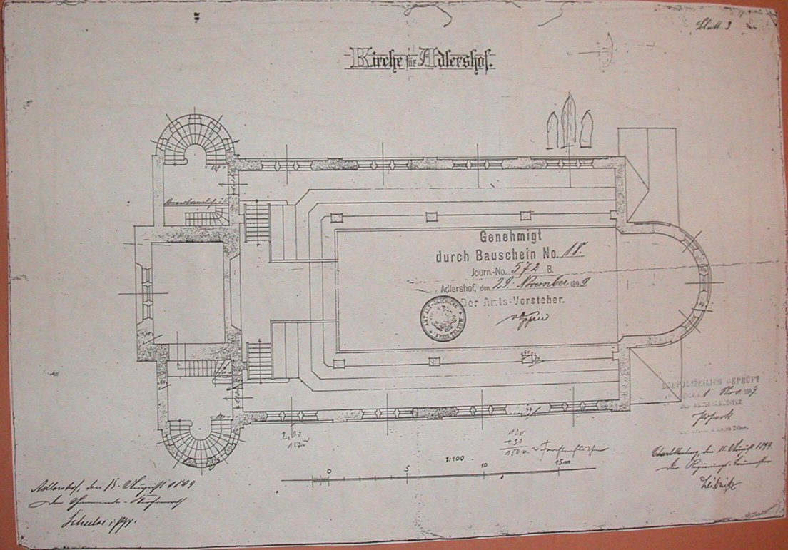 Verklärungskirche (Adleshof)